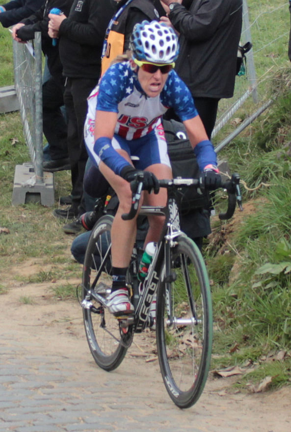 Judith Arndt & Kristin Armstrong attacking on the Oude Kwaremont; Ronde Van Vlaanderen voor Vrouwen 2012